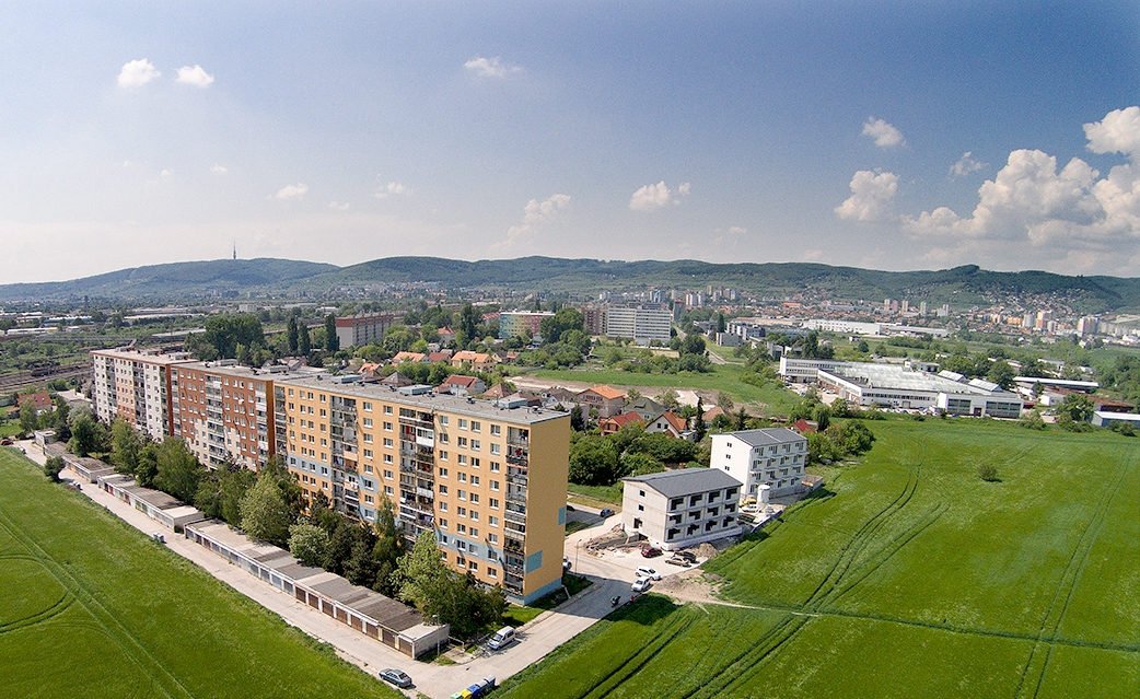 vychodne a sajby